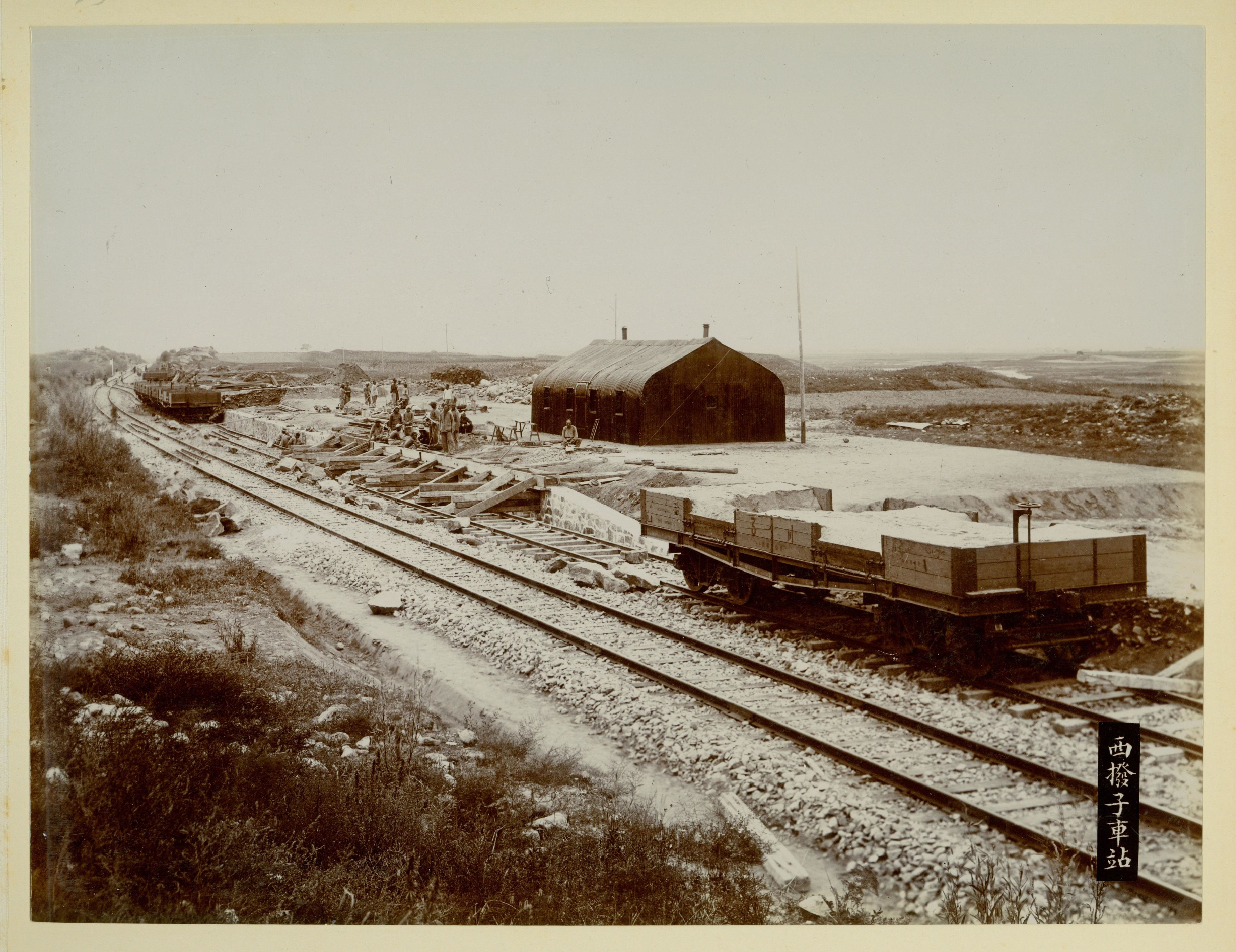 该图显示了京张铁路线上尚未竣工的西拨子车站。铁路工人聚集在铁轨旁。